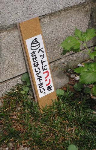 Hundekotverbot in Japan